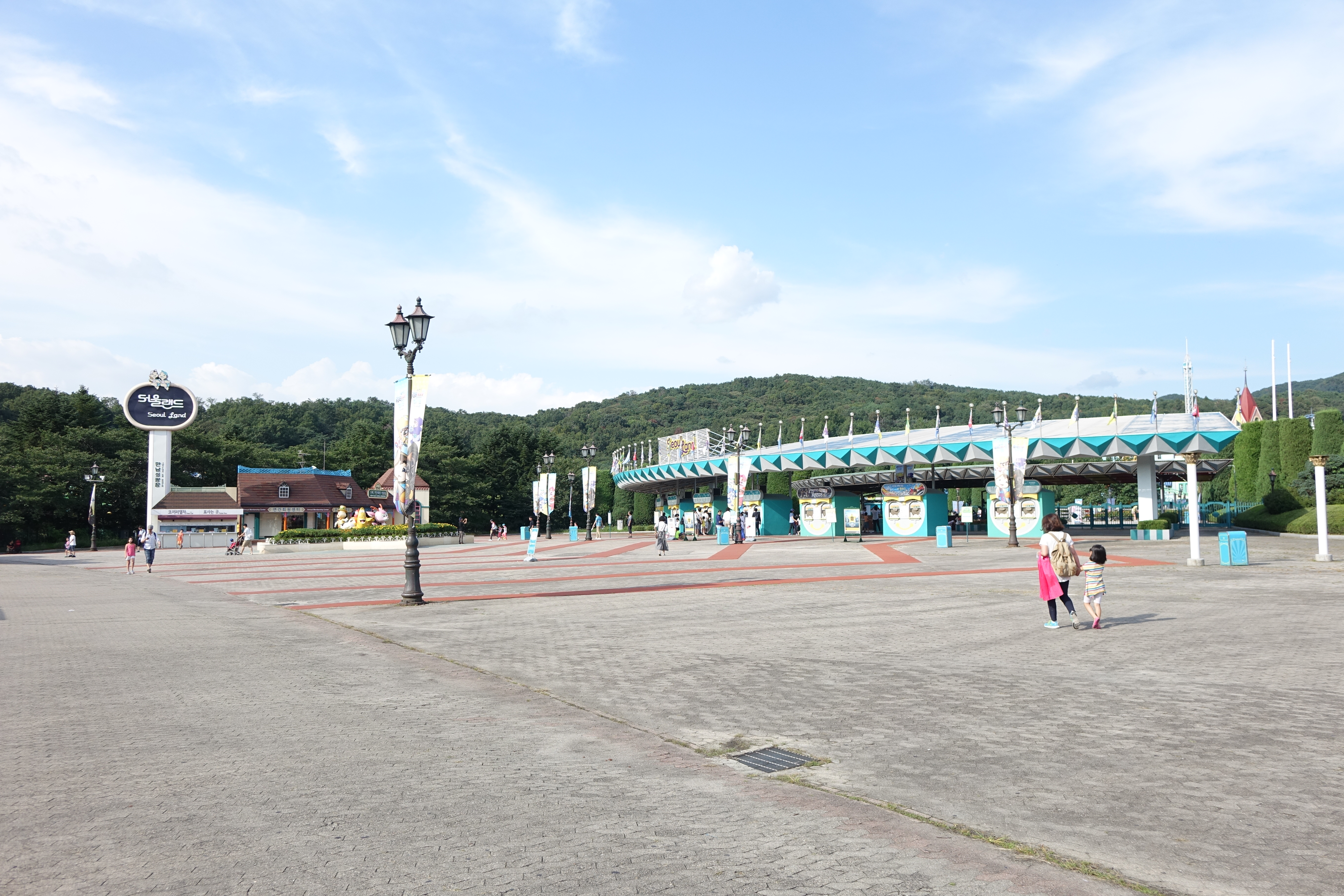 2014년 8월 경기도 과천시 서울대공원